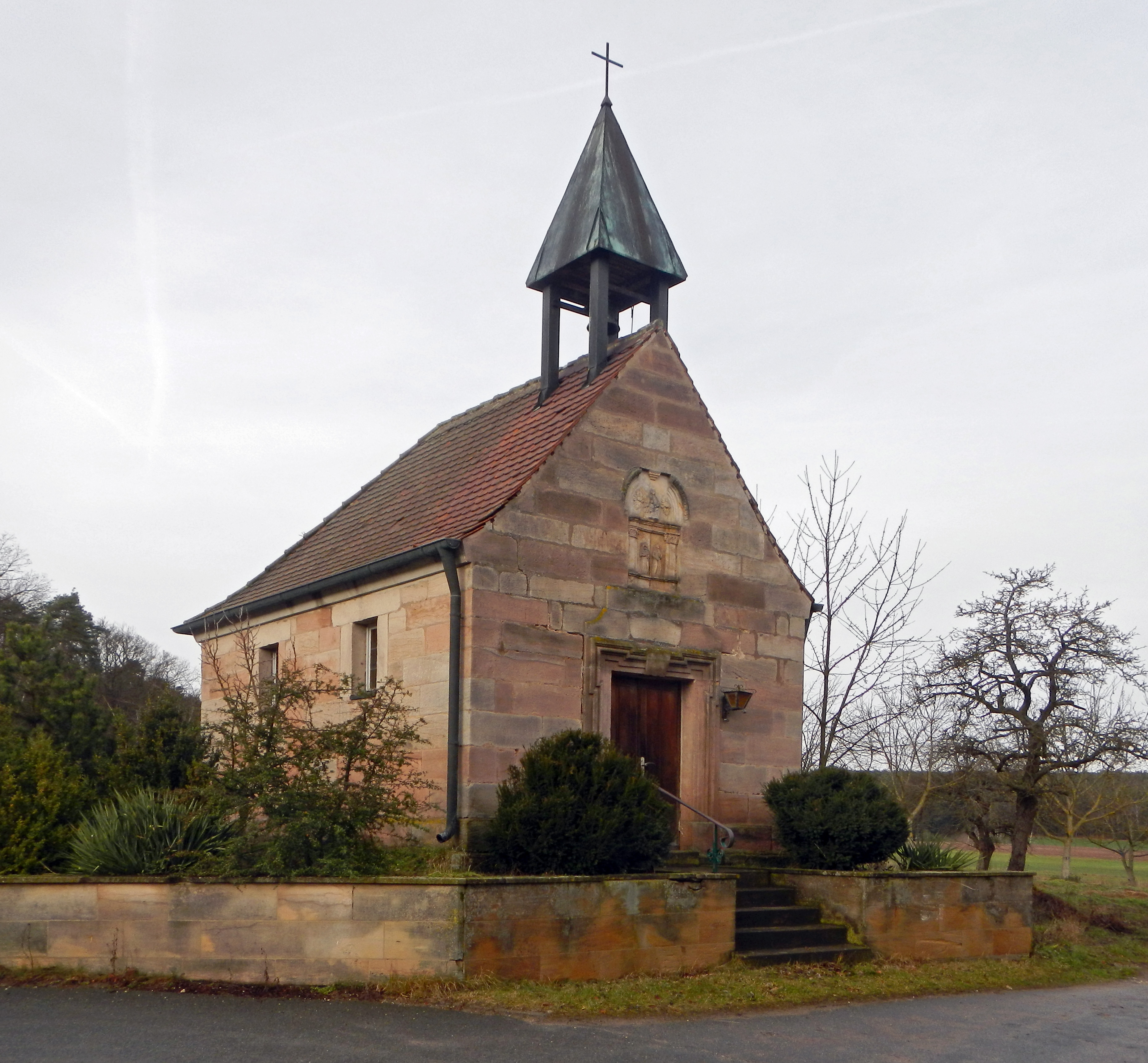 Katholische Kapelle St. Valentin, Sandsteinquader, 1. Hälfte 18. Jahrhundert; mit Ausstattung in Obermembach (Gemeinde Heßdorf) im Landkreis Erlangen-Höchstadt.